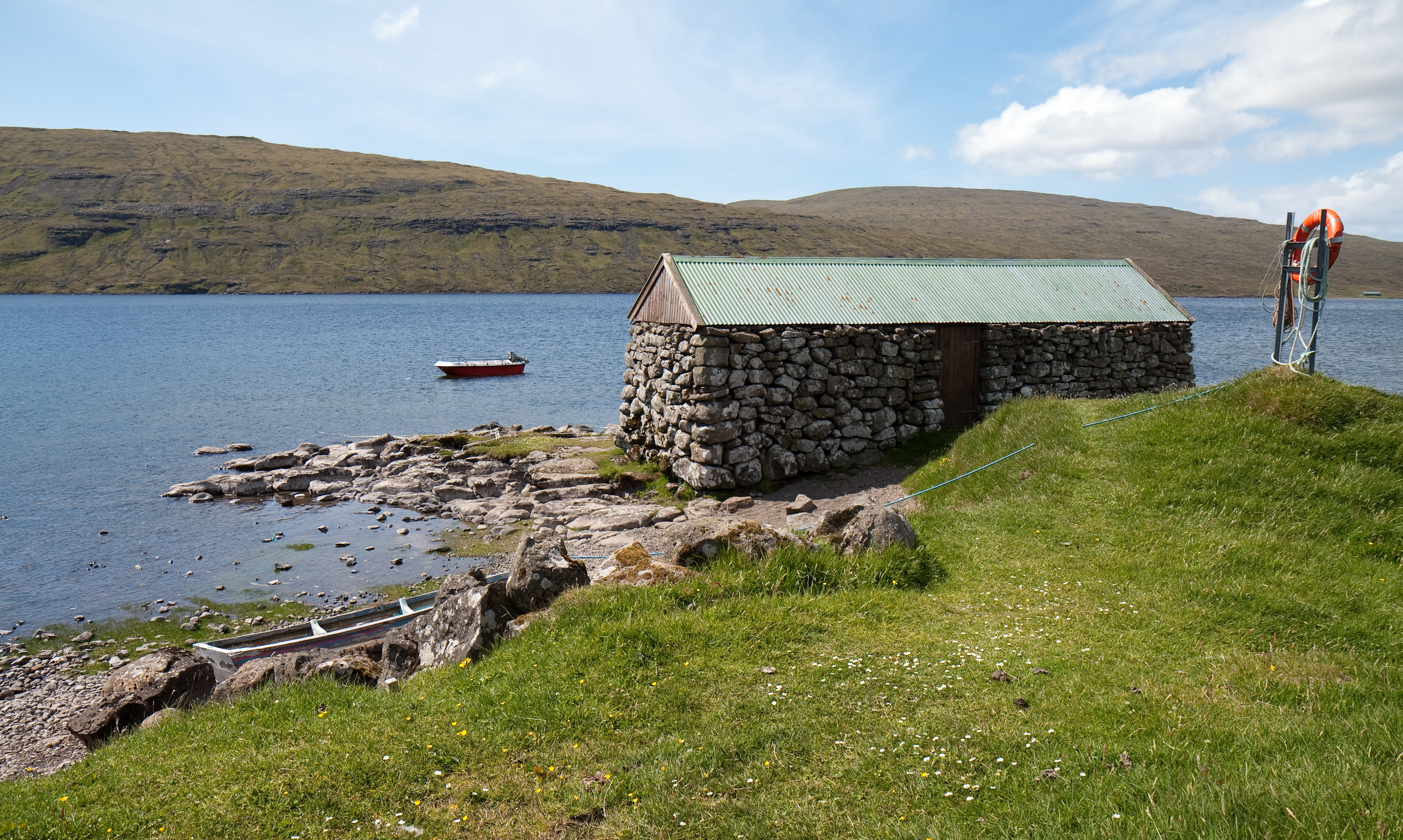 Sørvágsvatn